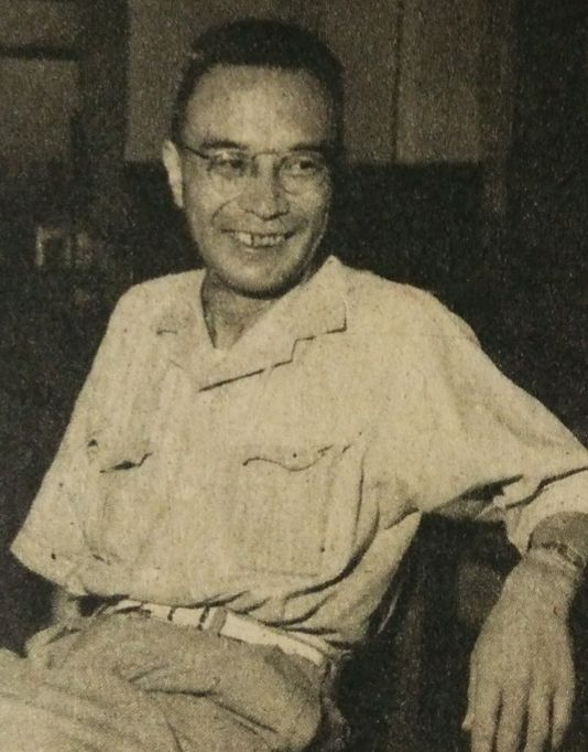 船田享二